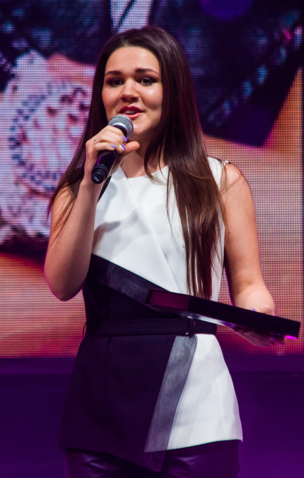 Дина Гарипова на Девичник Teens 2017